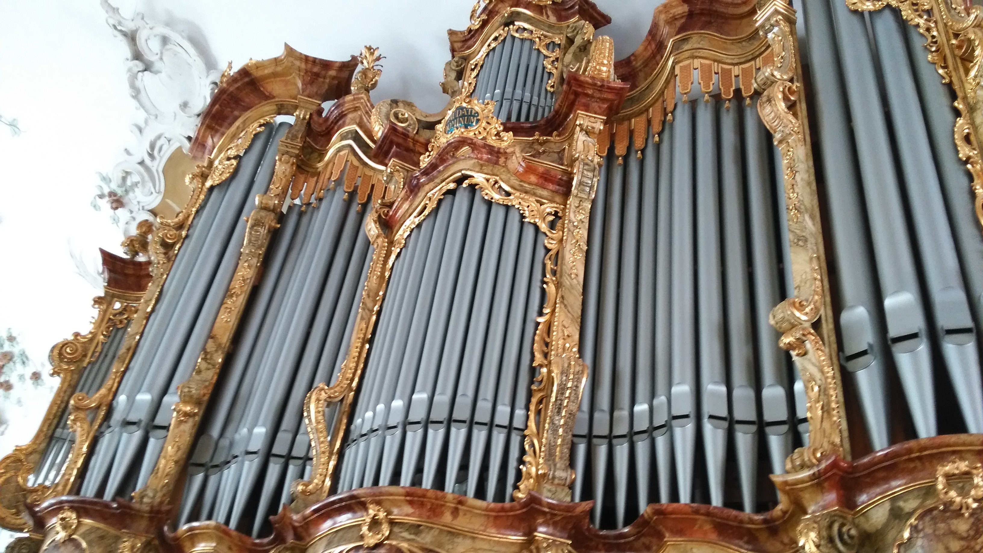 Orgel